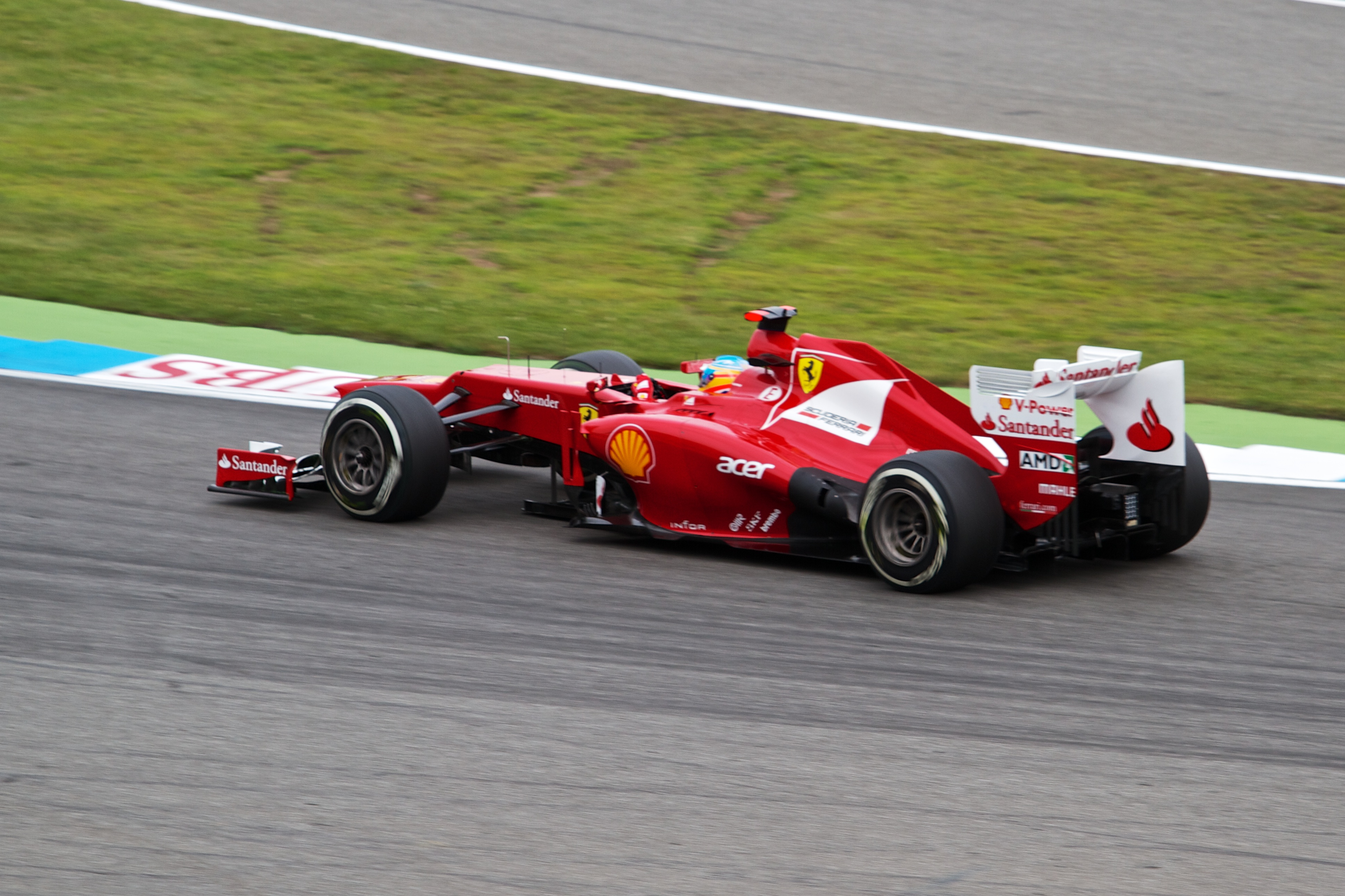 Fernando Alonso pendant les EL du Grand Prix d'Allemagne 2012 sur Ferrari F2012.